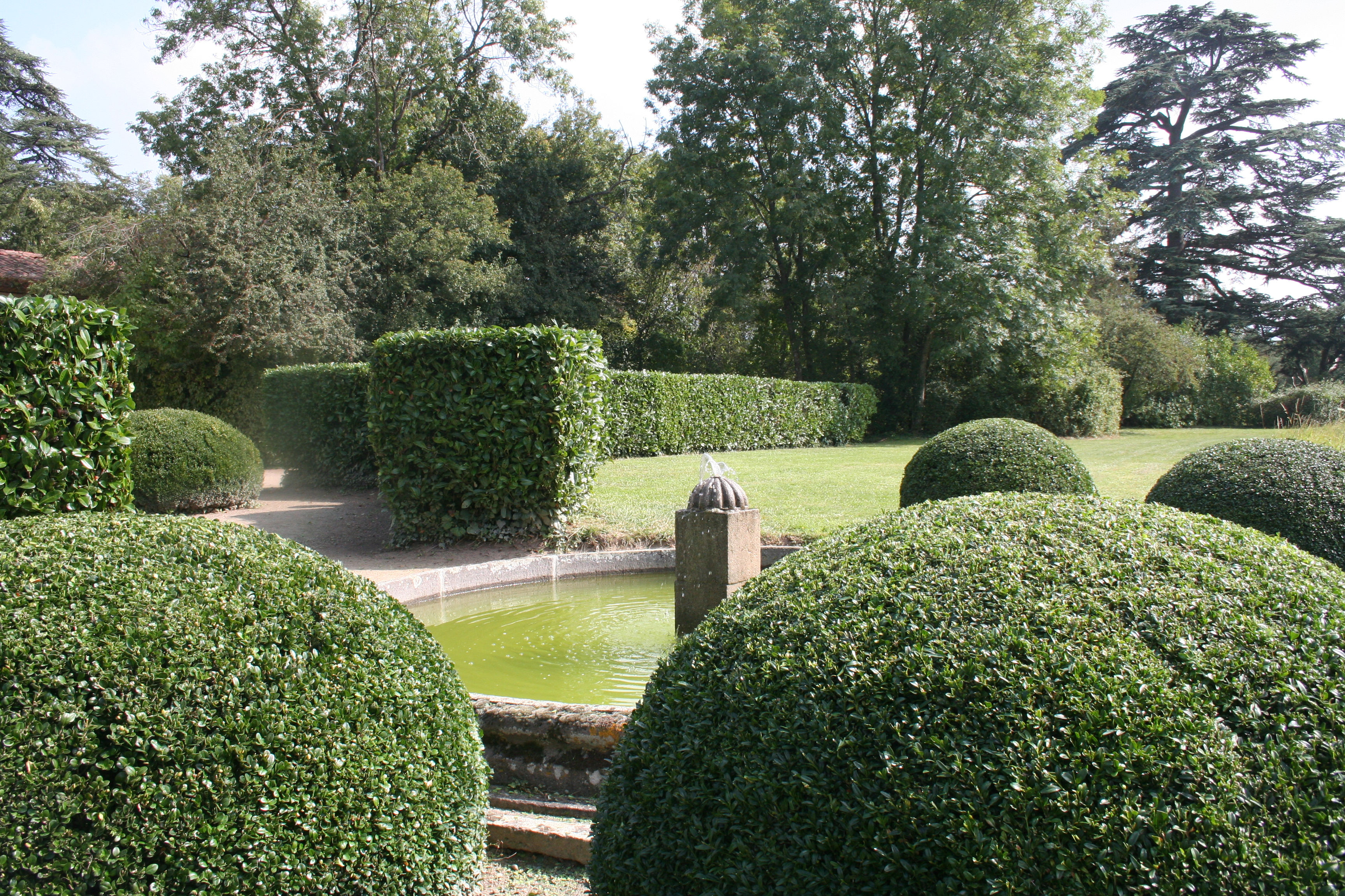 Les boules de buis des jardins de La Croze